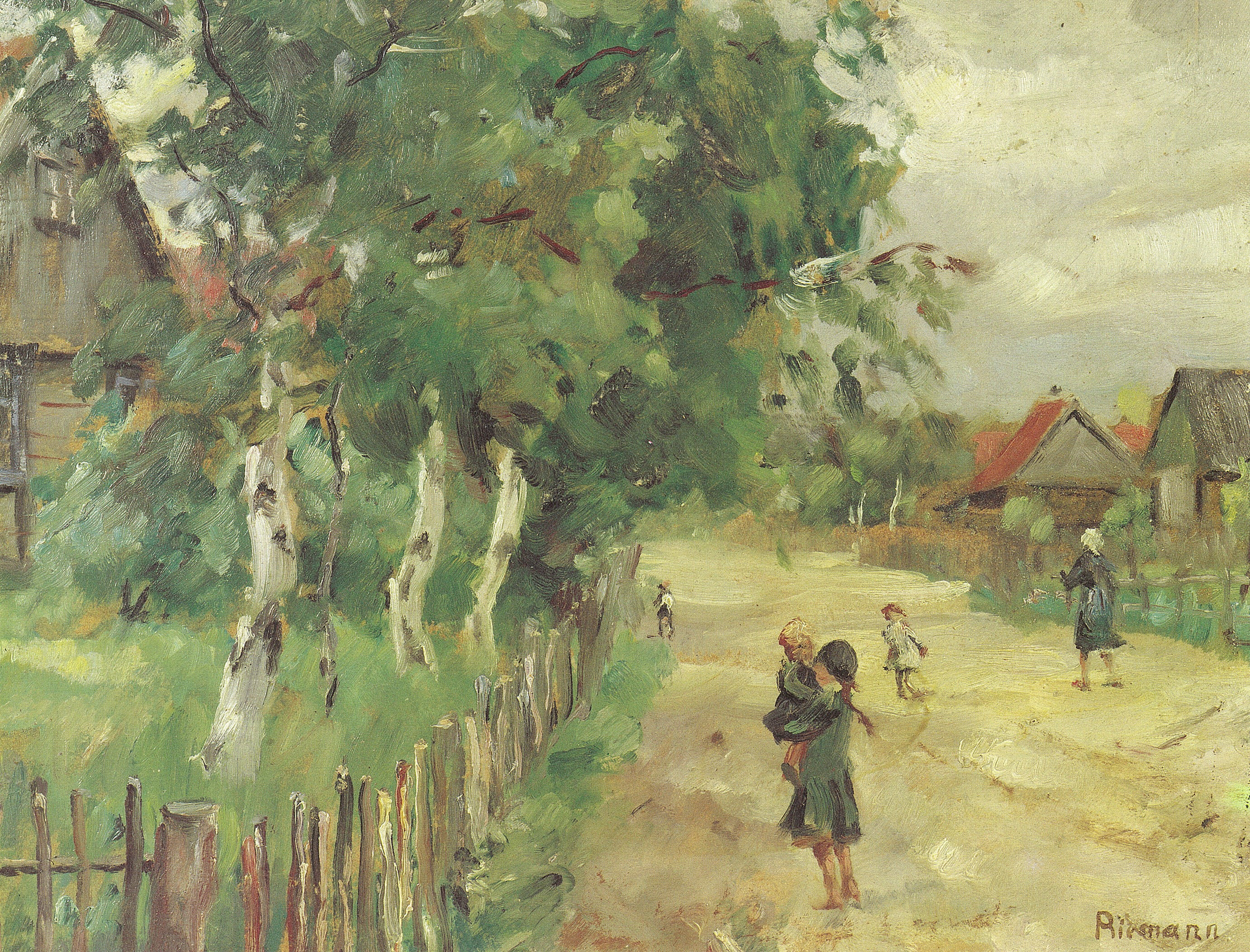 Ölgemälde „Dorfstraße in Nidden“